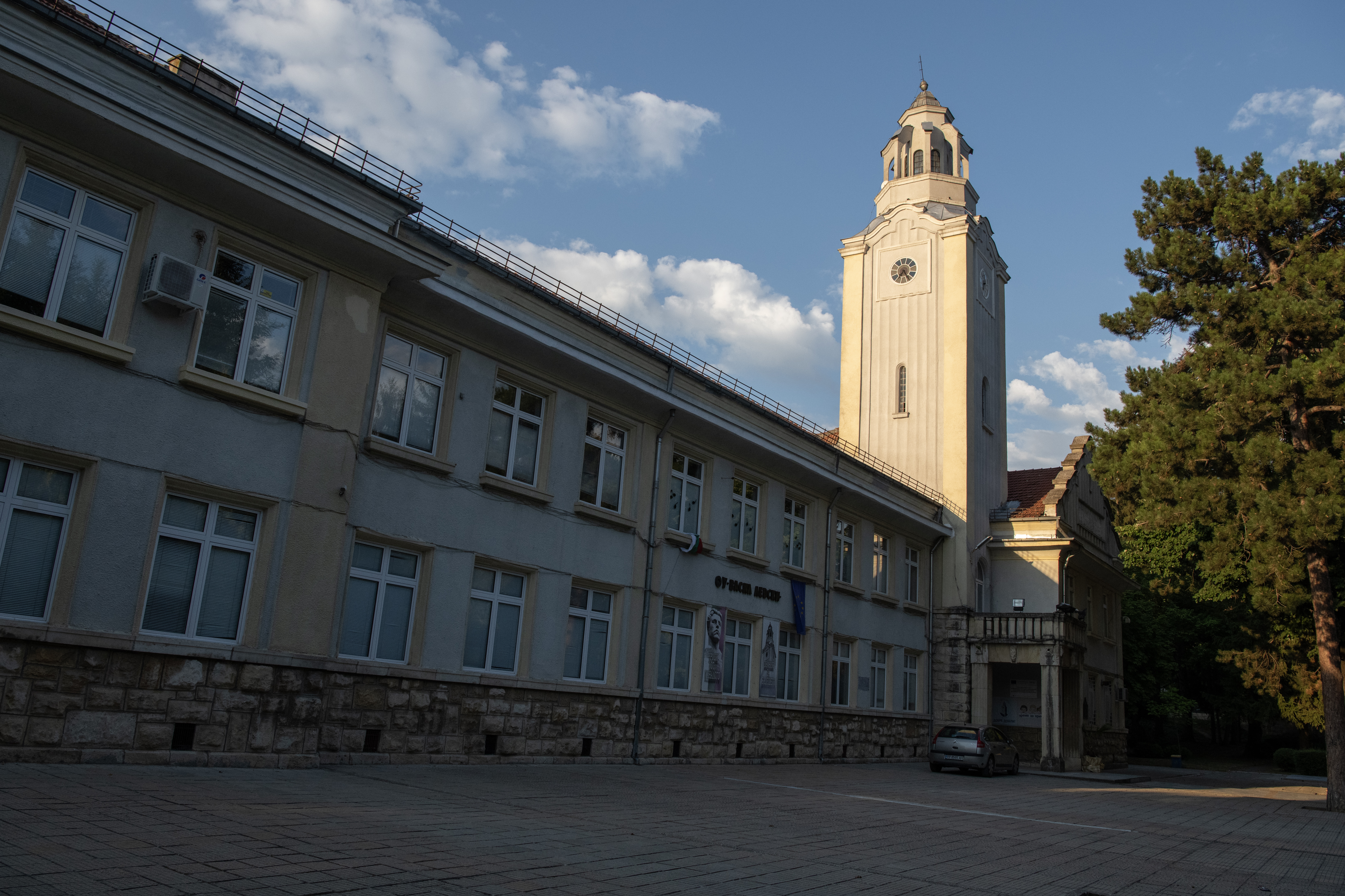 Снимката документира основното училище "Васил Левски" в град Разград.